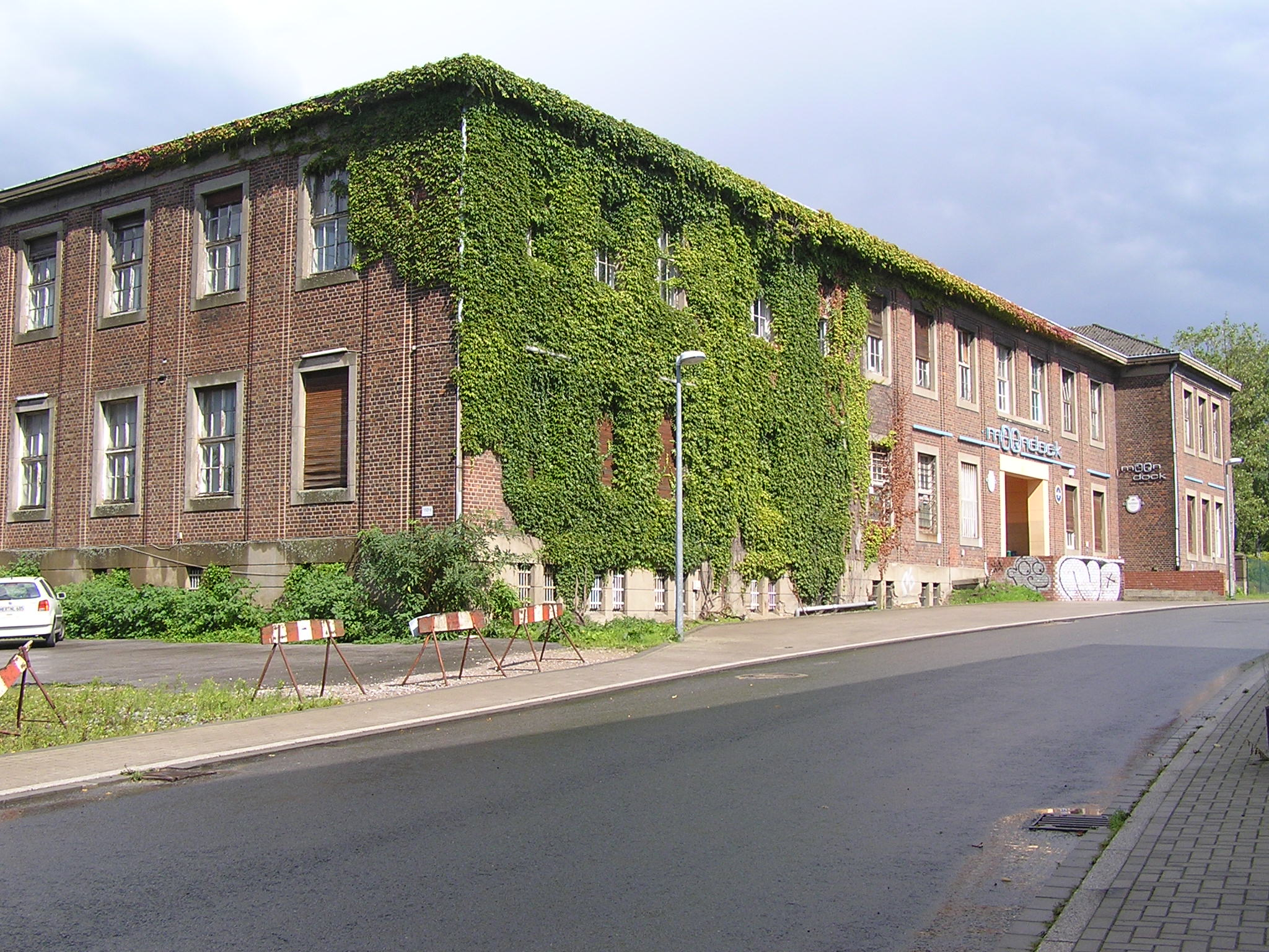 Betriebsgebäude (Verwaltung und Lohnhalle) der Zeche König Ludwig 1/2, Recklinghausen